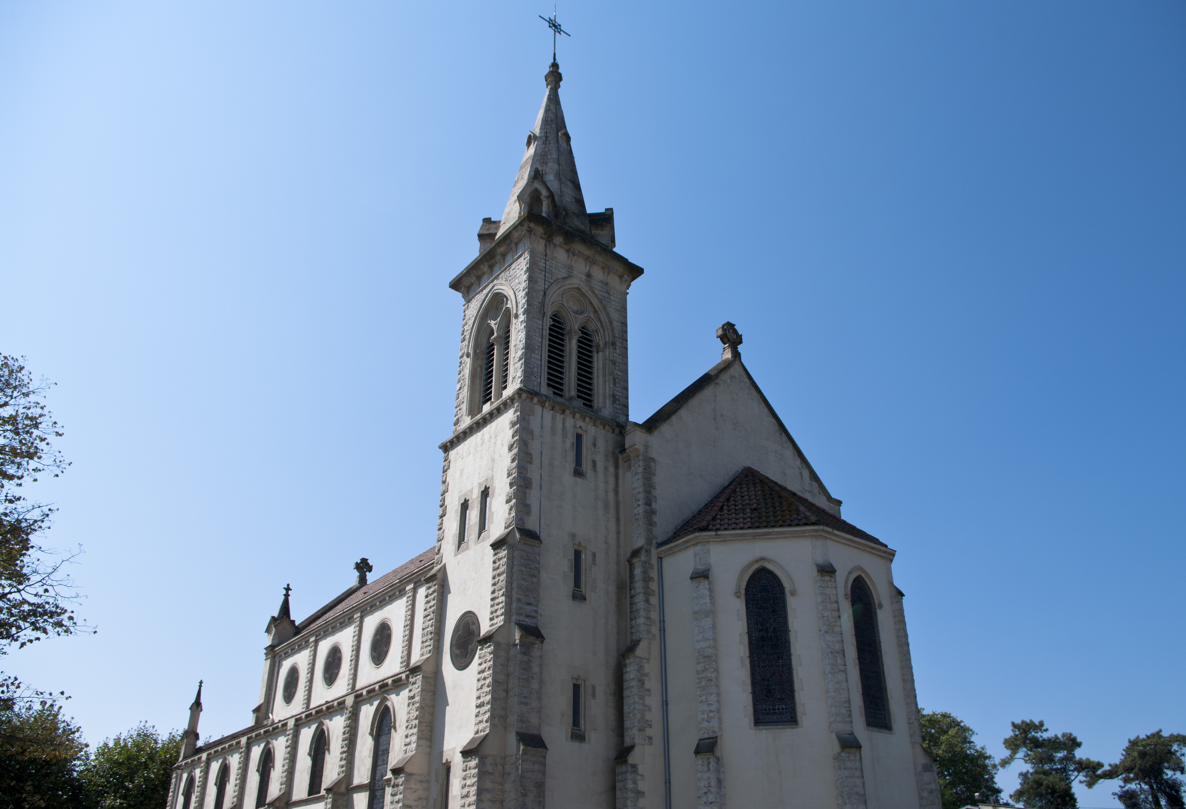 L'église Notre-Dame des Forges est un lieu de culte catholique situé dans la commune de Tarnos, dans le département français des Pyrénées-Atlantiques. .